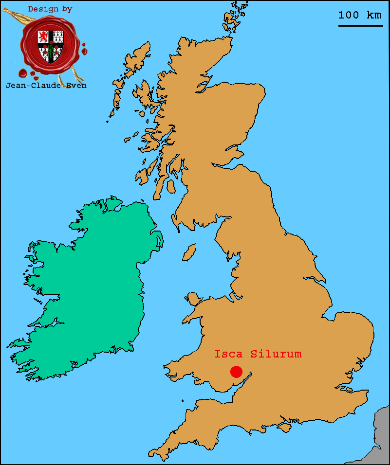 Kartenn lec'hiañ